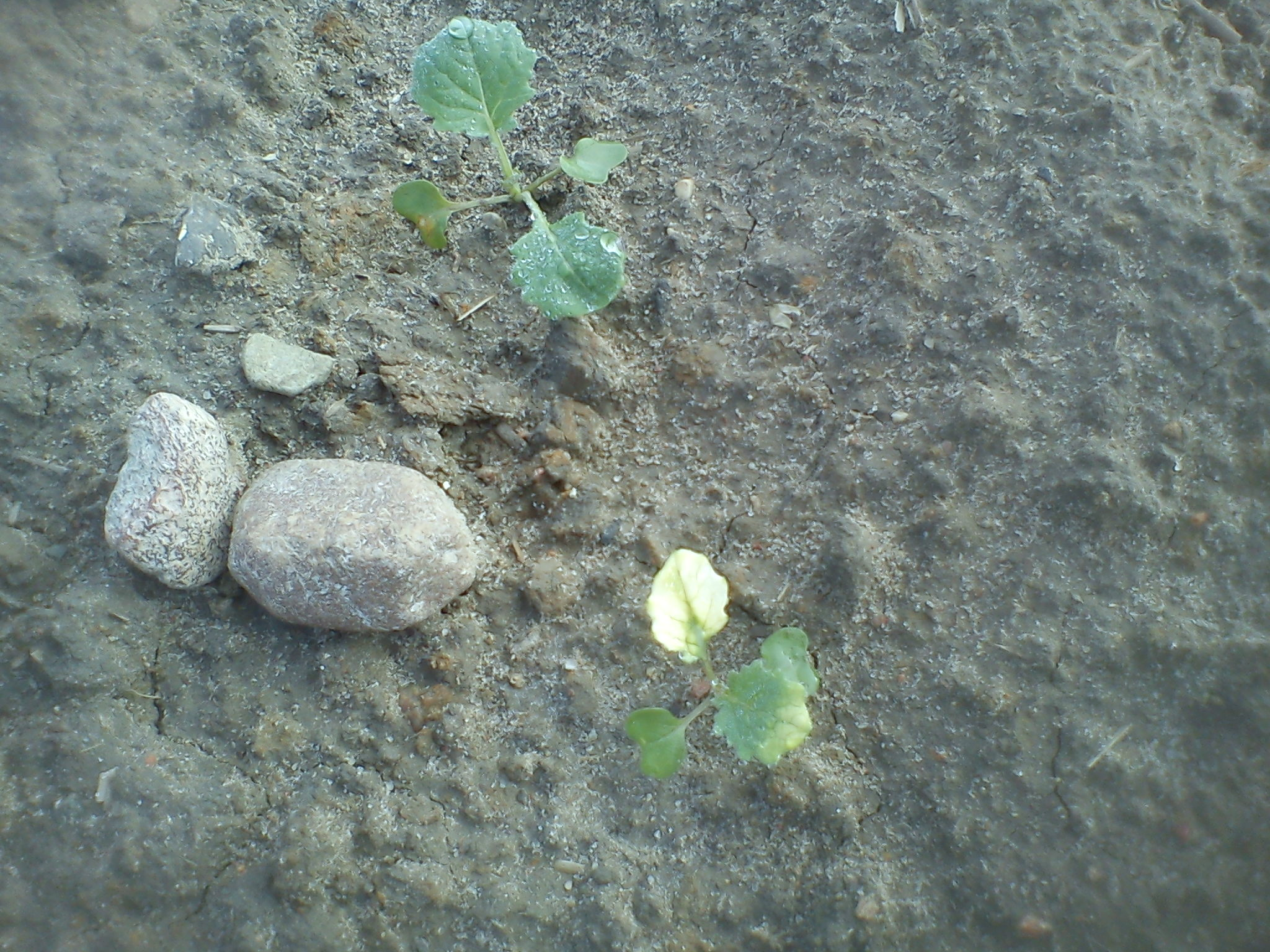 Nieszkodliwe przebarwienia na rzepaku powstałe po zastosowaniu herbicydu opartego na chlomazonie